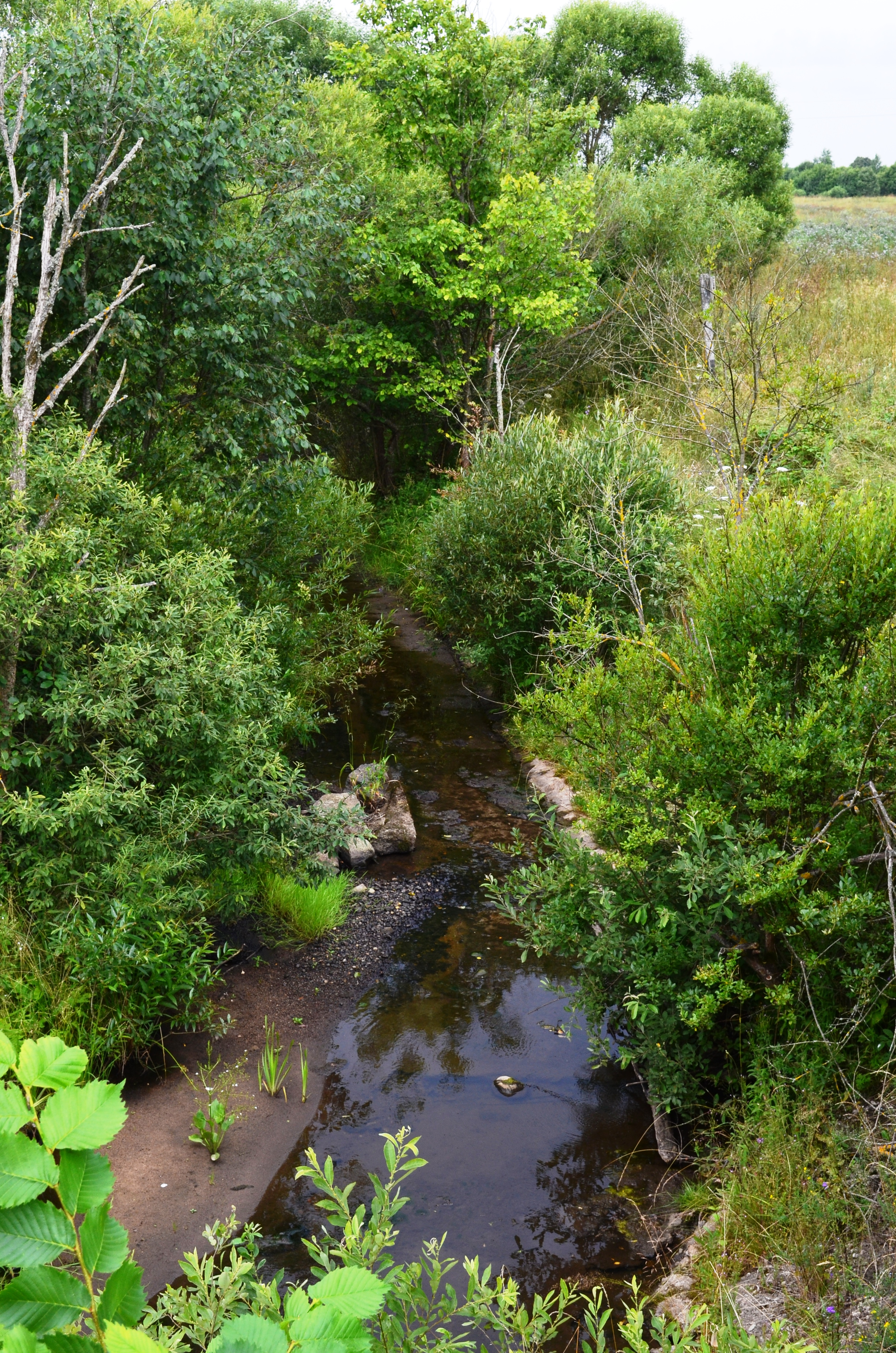 Širvinta (Šventosios intakas) ties Pustilta, Vilniaus r.